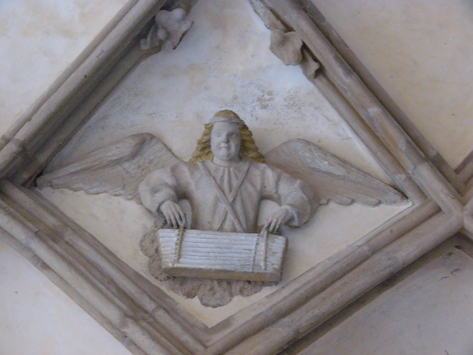 Musizierende Engel im Gewölbe des Himmelkroner Kreuzgangs